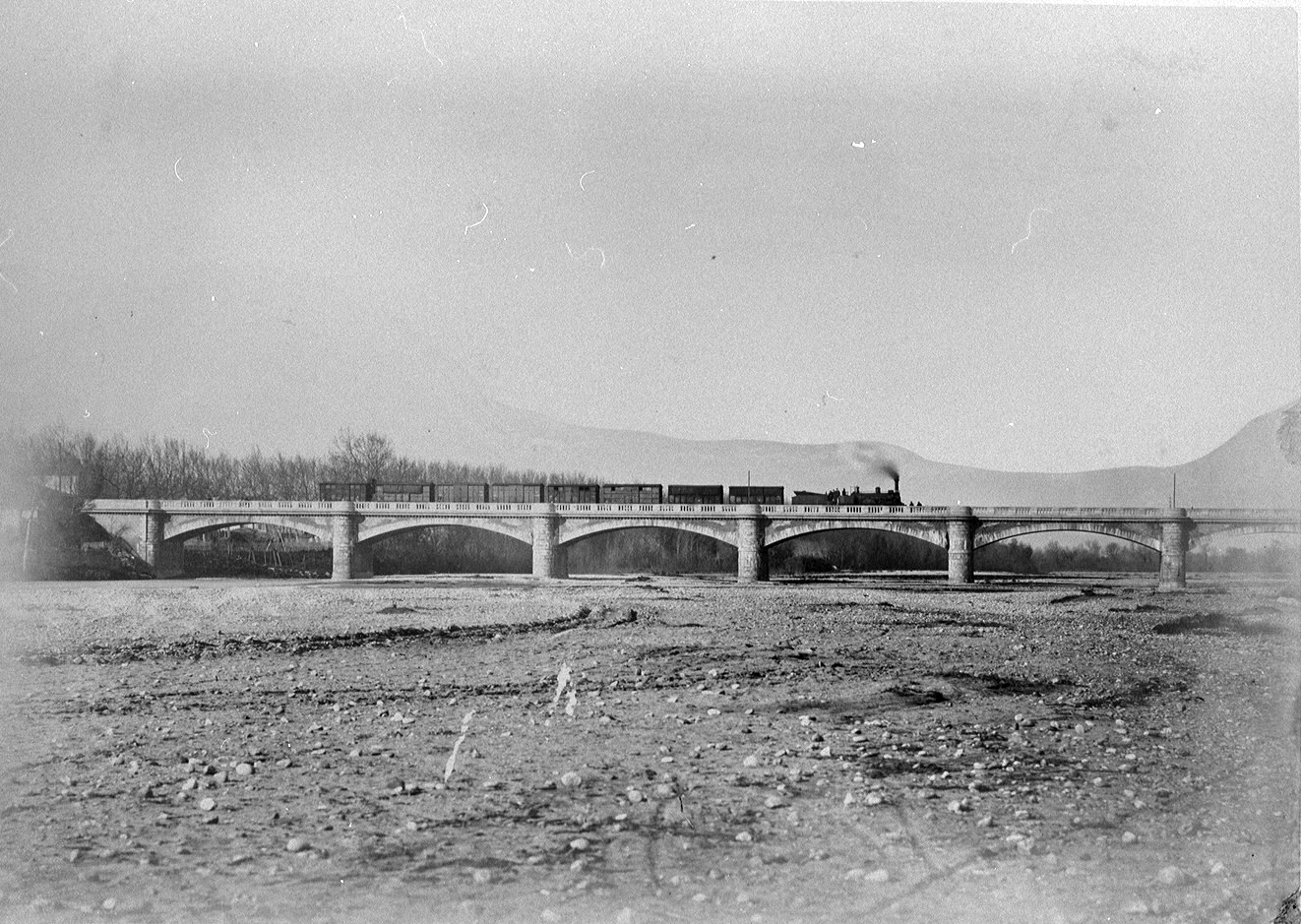 Pont sur la Têt, à l'entrée de Perpignan, de la ligne de Narbonne à Portbou.